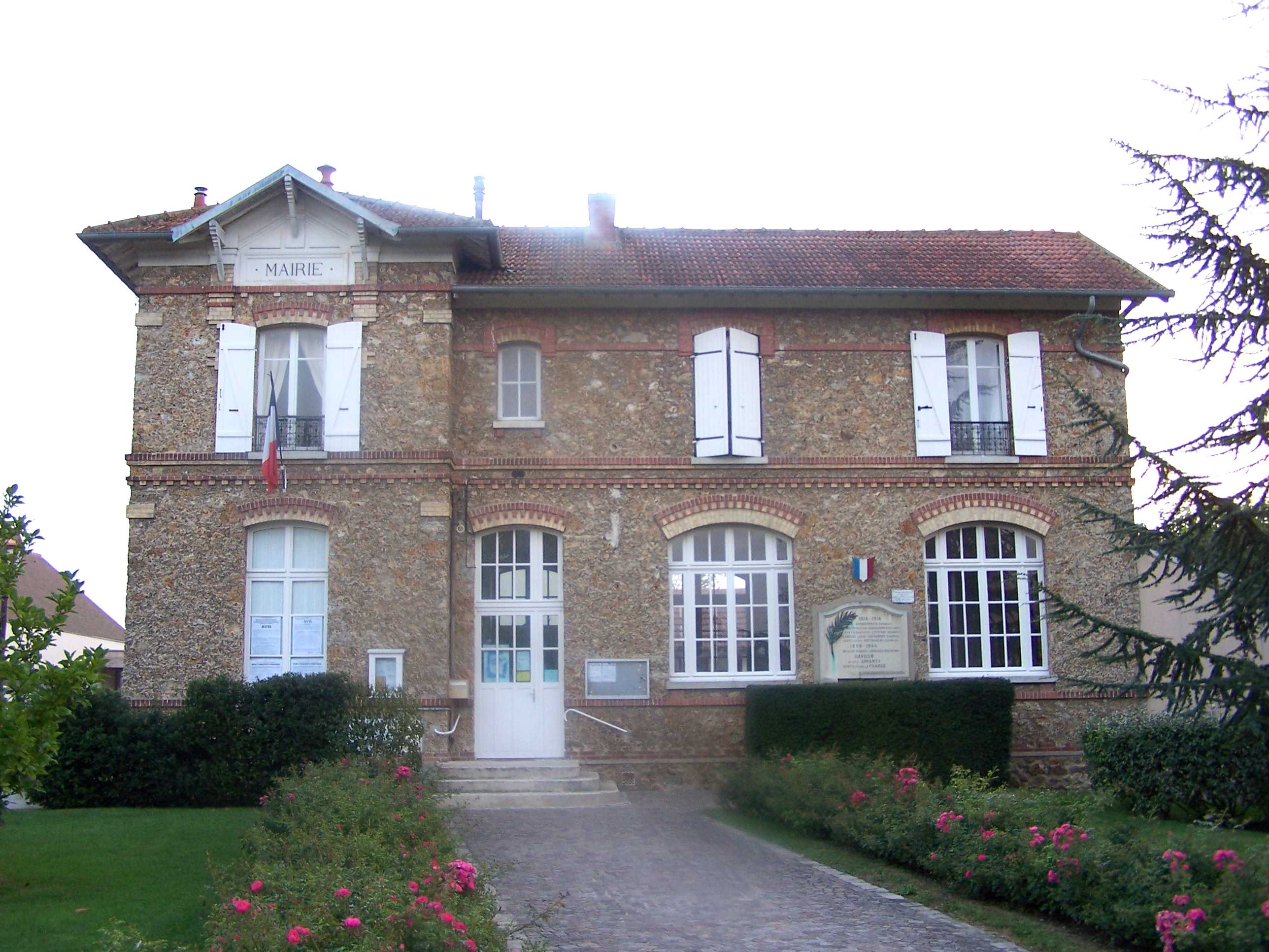 Mairie de Davron (Yvelines, France)